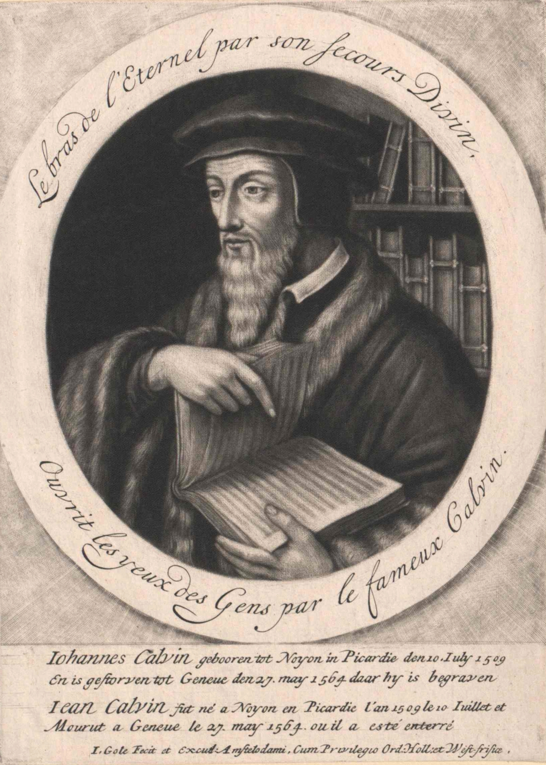 Calvin, Johann (1509 - 1564) Schlagworte Geistlicher, Porträt, Reformator, Theologie Digitale Sammlung Porträtsammlung